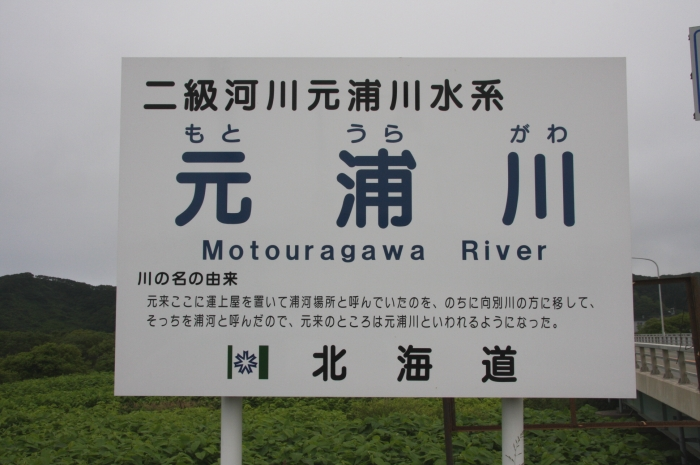 元浦川の河川標識 荻伏より